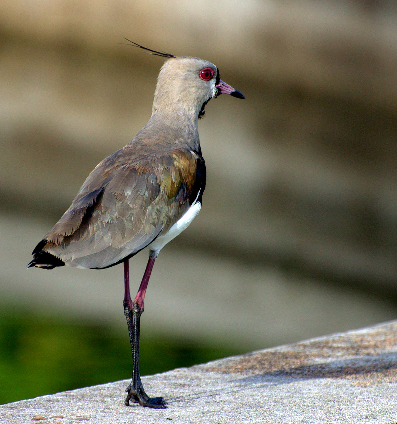 Parque da Independência, Museu do Ipiranga, São Paulo